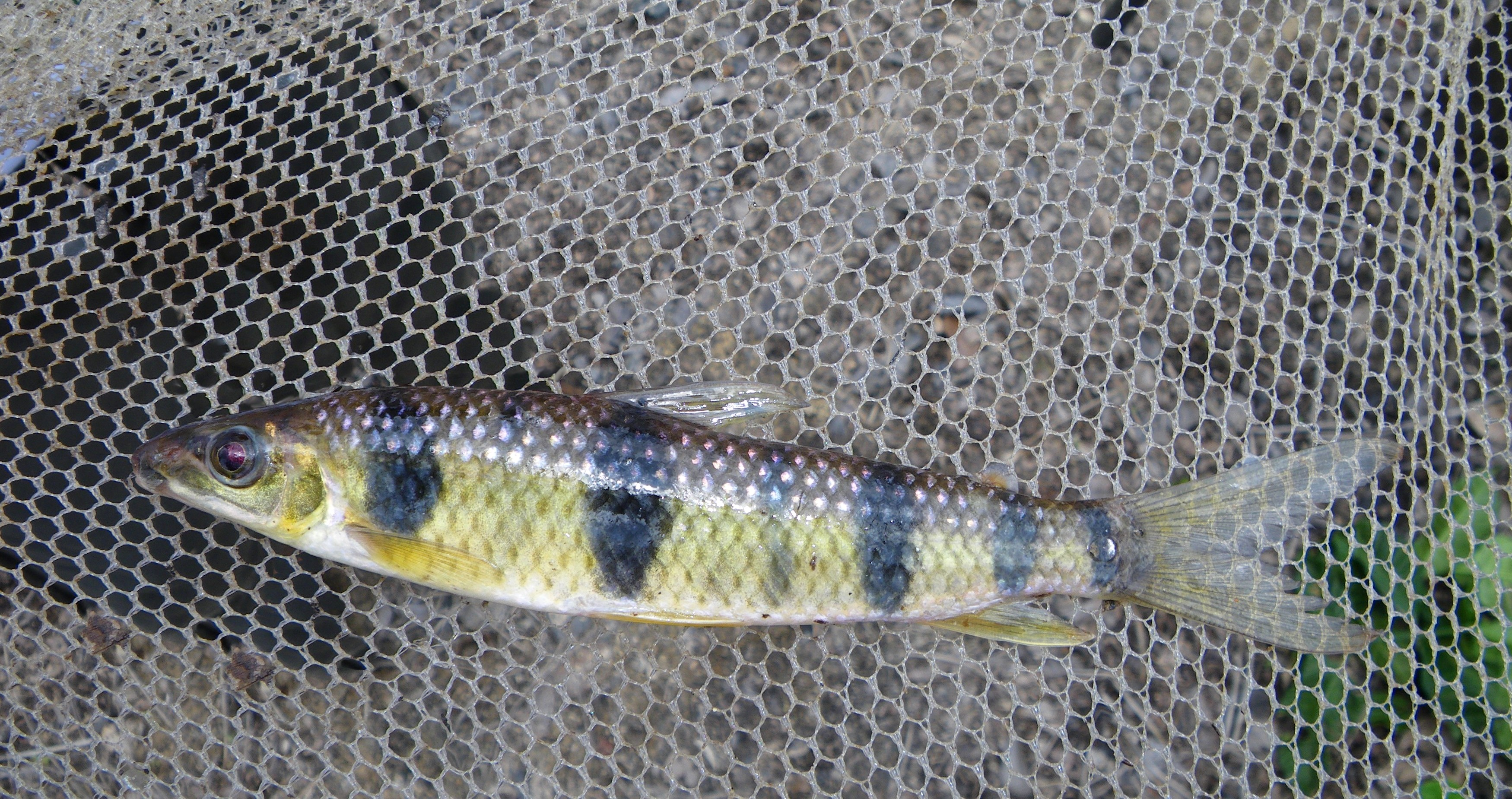 Leporinus maculatus, poisson d'eau douce du fleuve Sinnamary (Guyane) de 18cm , pêché en septembre 2008 par Daniel LAURENT